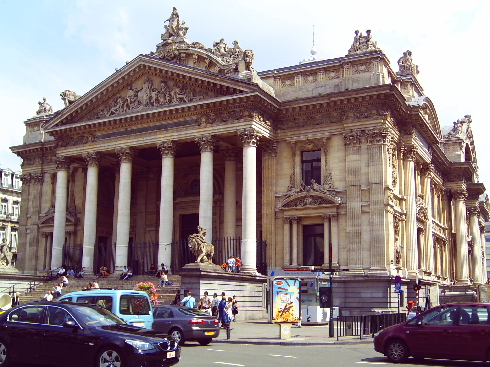 Stock market of Brussels